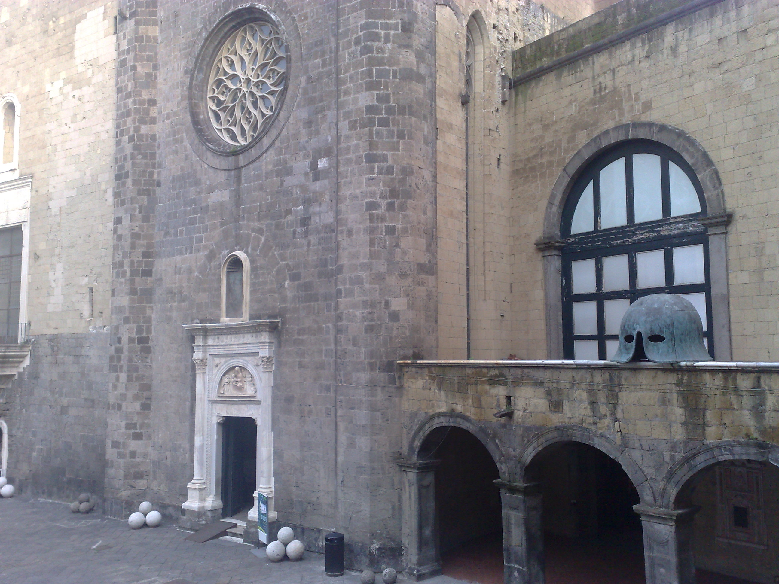 Vista dal balconcino posto al lato destro del cortile d'ingresso del Maschio Angioino.